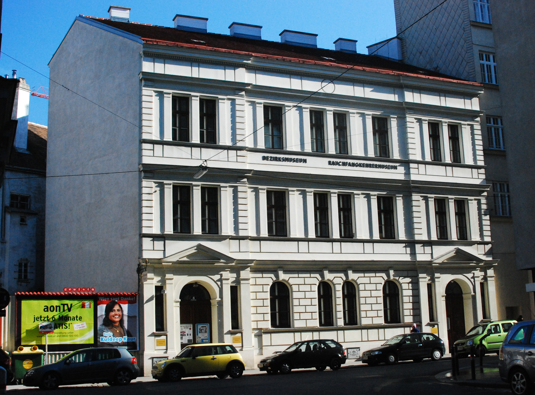 Bezirksmuseum Wieden + Rauchfangkehrermuseum in der Klagbaumgasse in Wien-Wieden